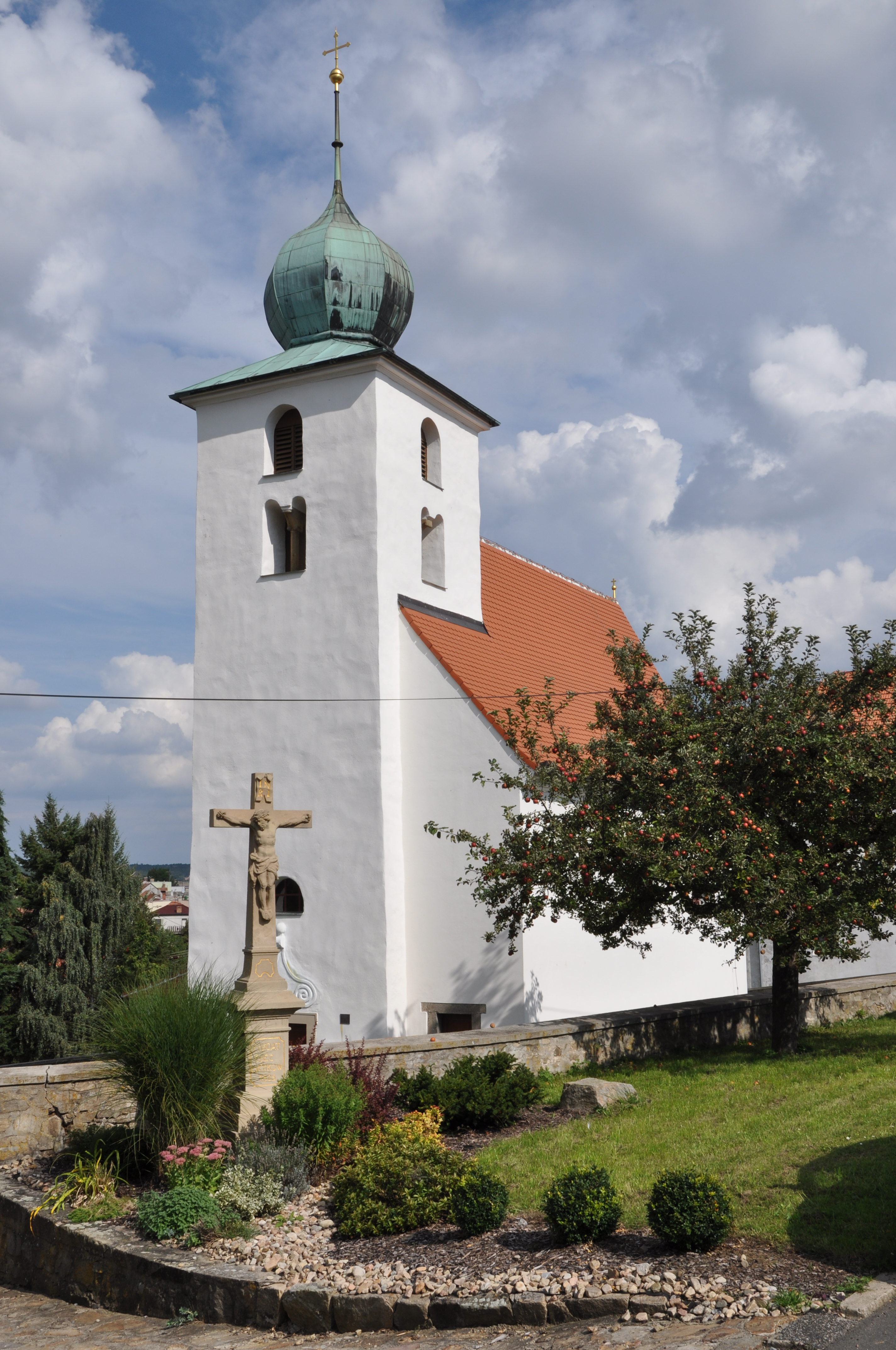 Lukovany - kostel svatého Václava.